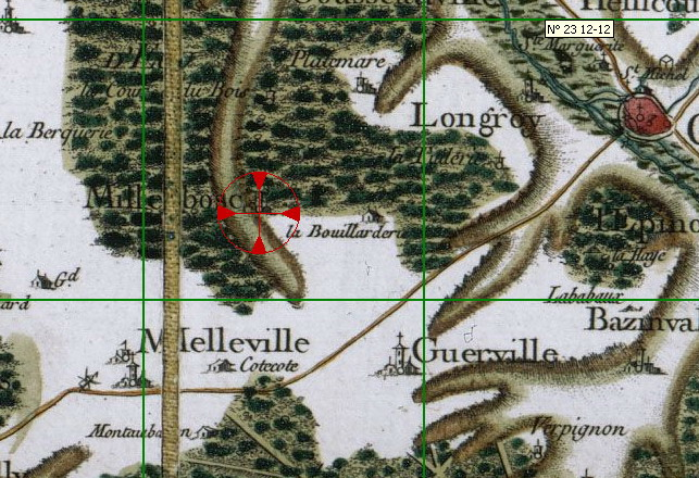 Zoom sur carte Cassini de Millebosc